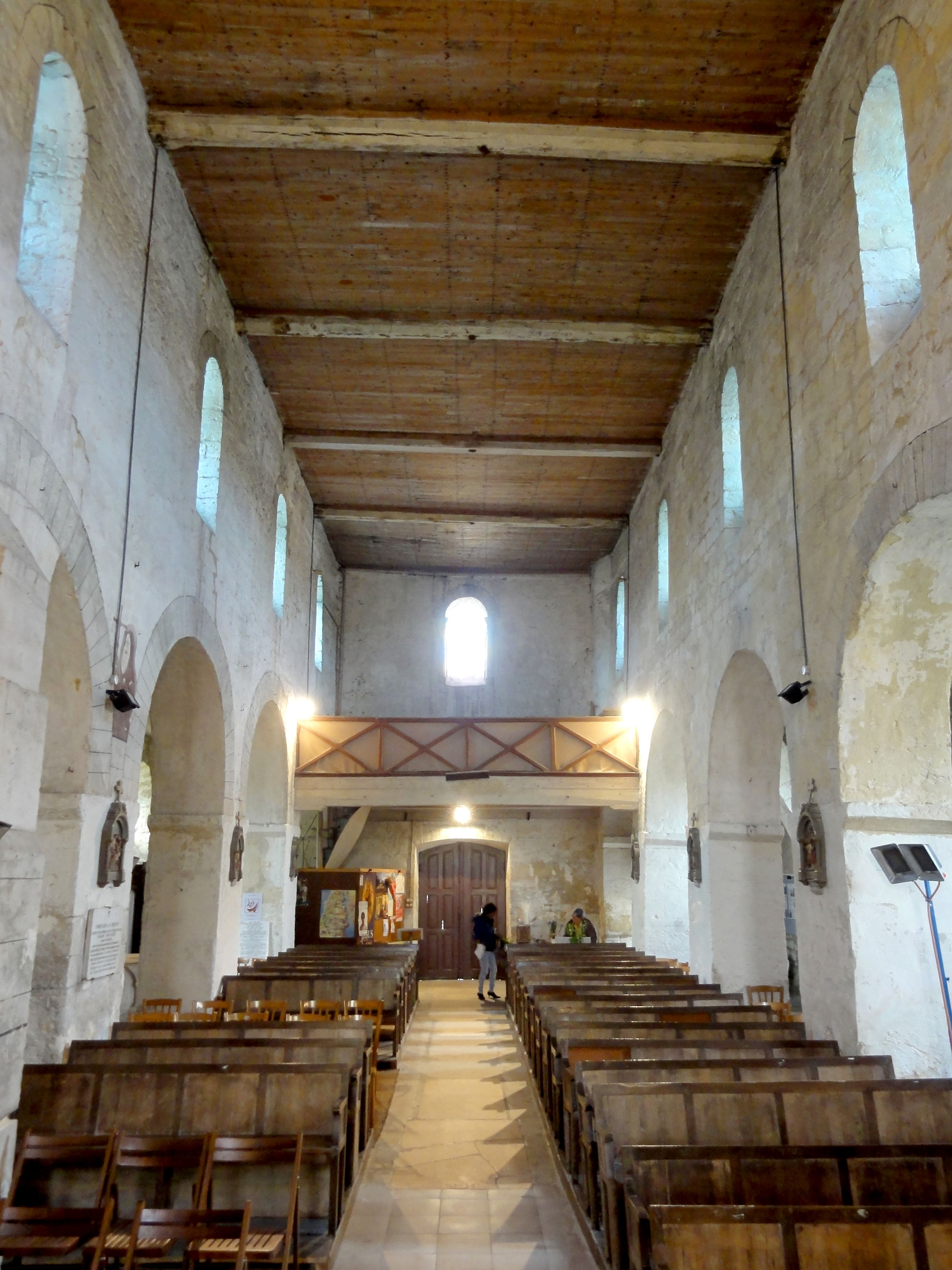 Nef, vue vers l'iuest.